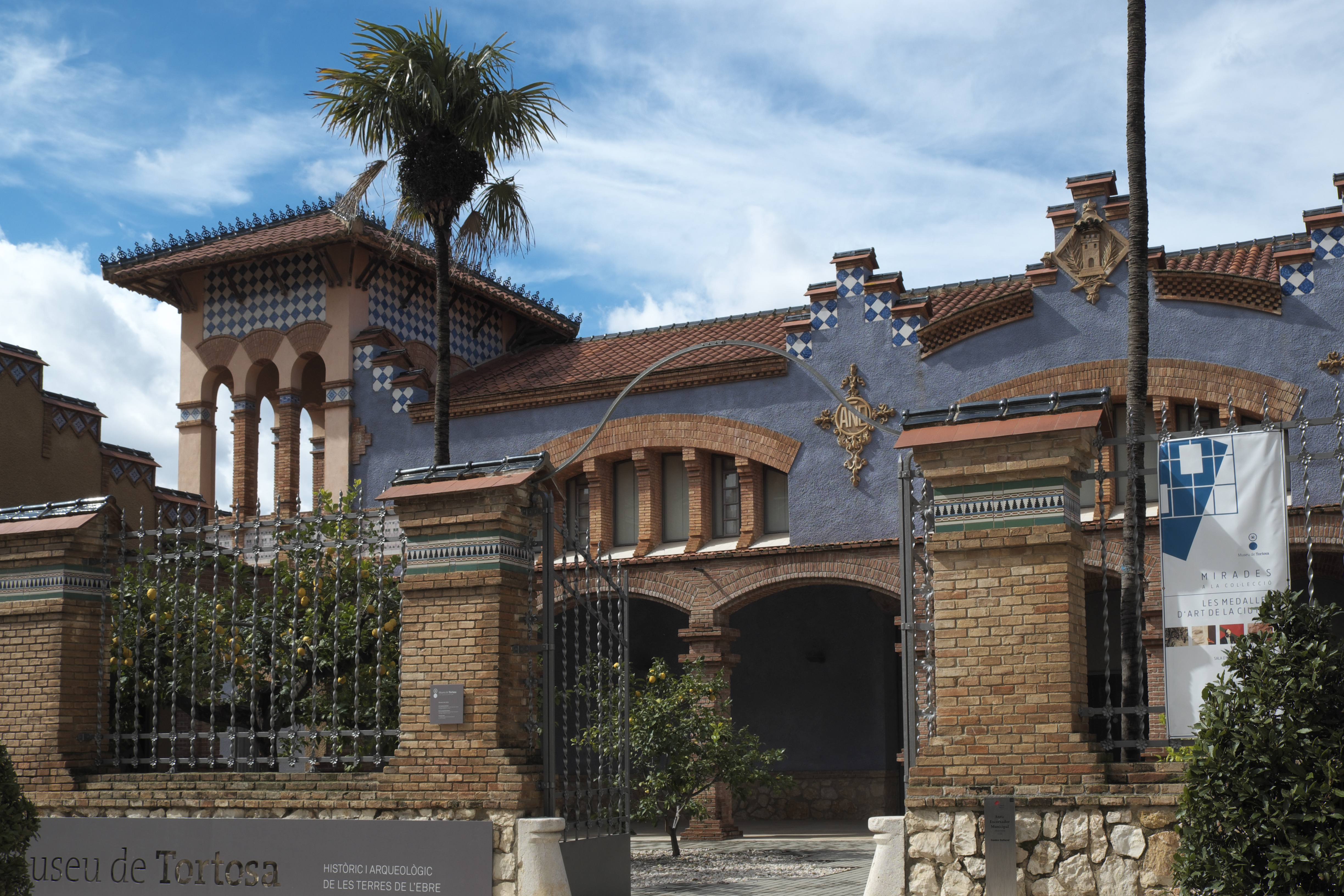 Ehemaliger Schlachthof in Tortosa in der Provinz Tarragona (Katalonien/Spanien), 1906/08 von Pablo Monguió errichtet